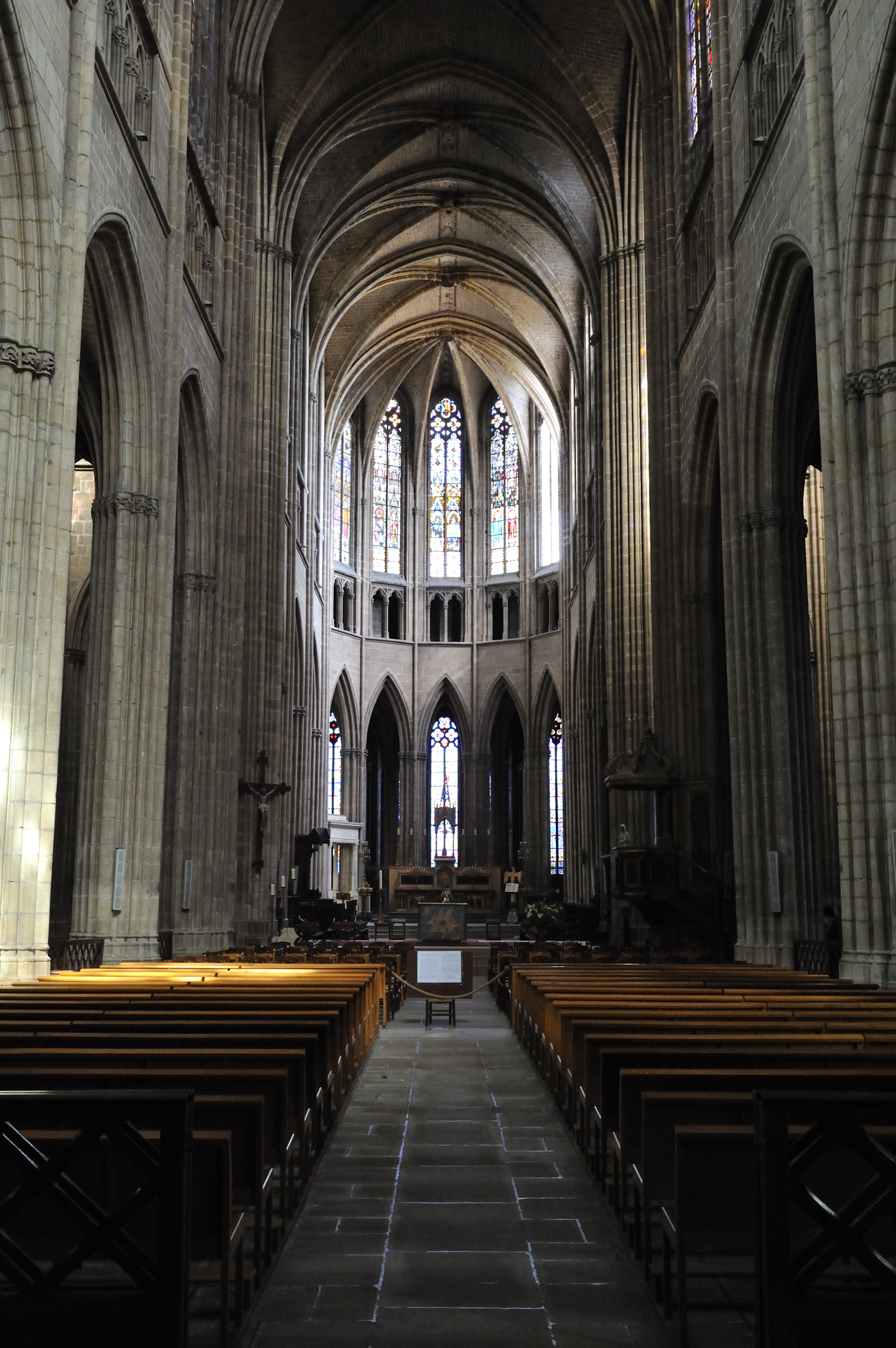 Cathédrale Saint-Étienne, Limoges, Haute-Vienne, France